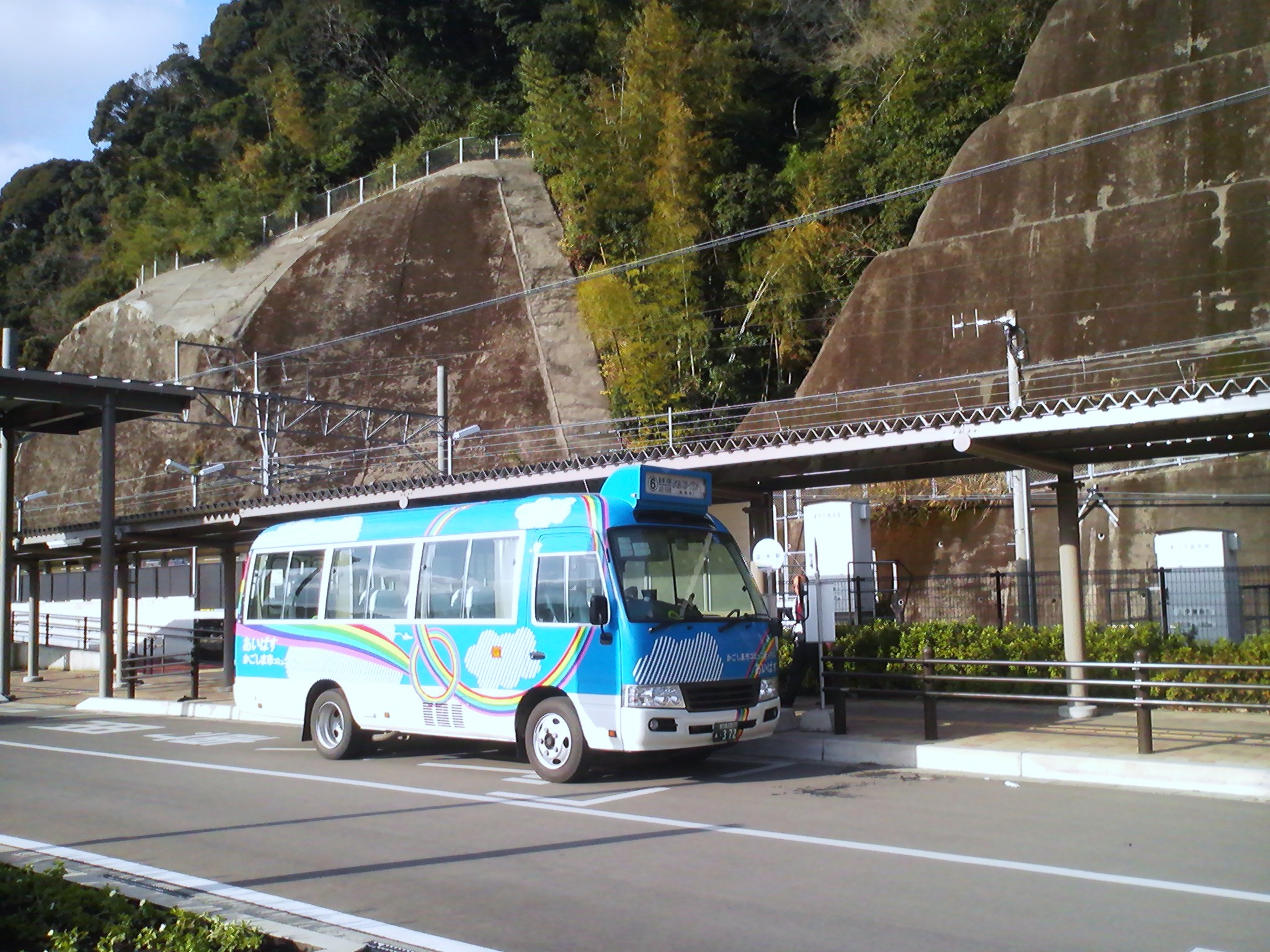 鹿児島市コミュニティバスの「あいばす」の画像。（広木駅前にて）